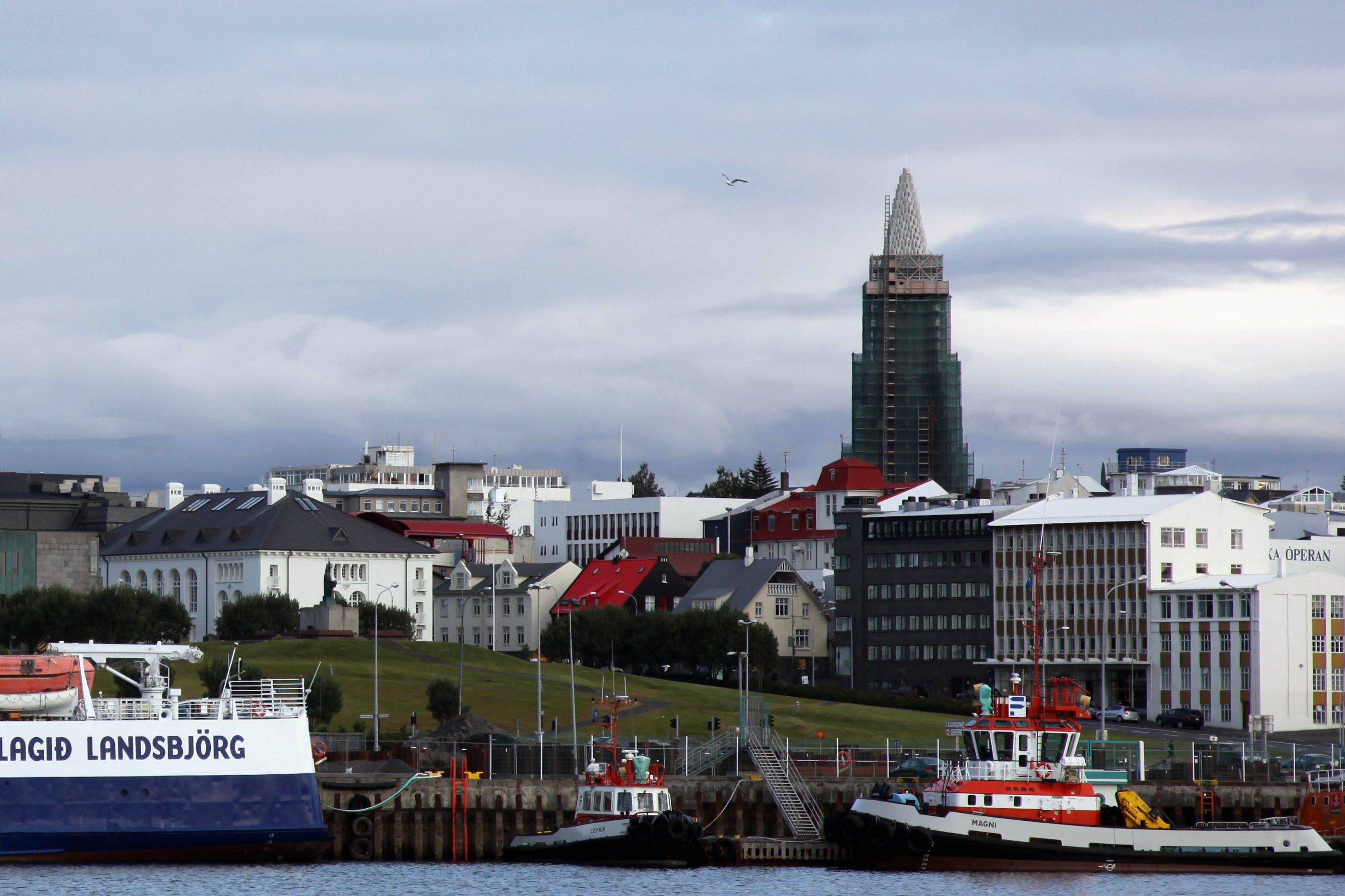 Une vue de Reykjavik en août 2009, depuis le port ; en arrière-plan, on voit Hallgrimskirkja couverte d’échafaudages.